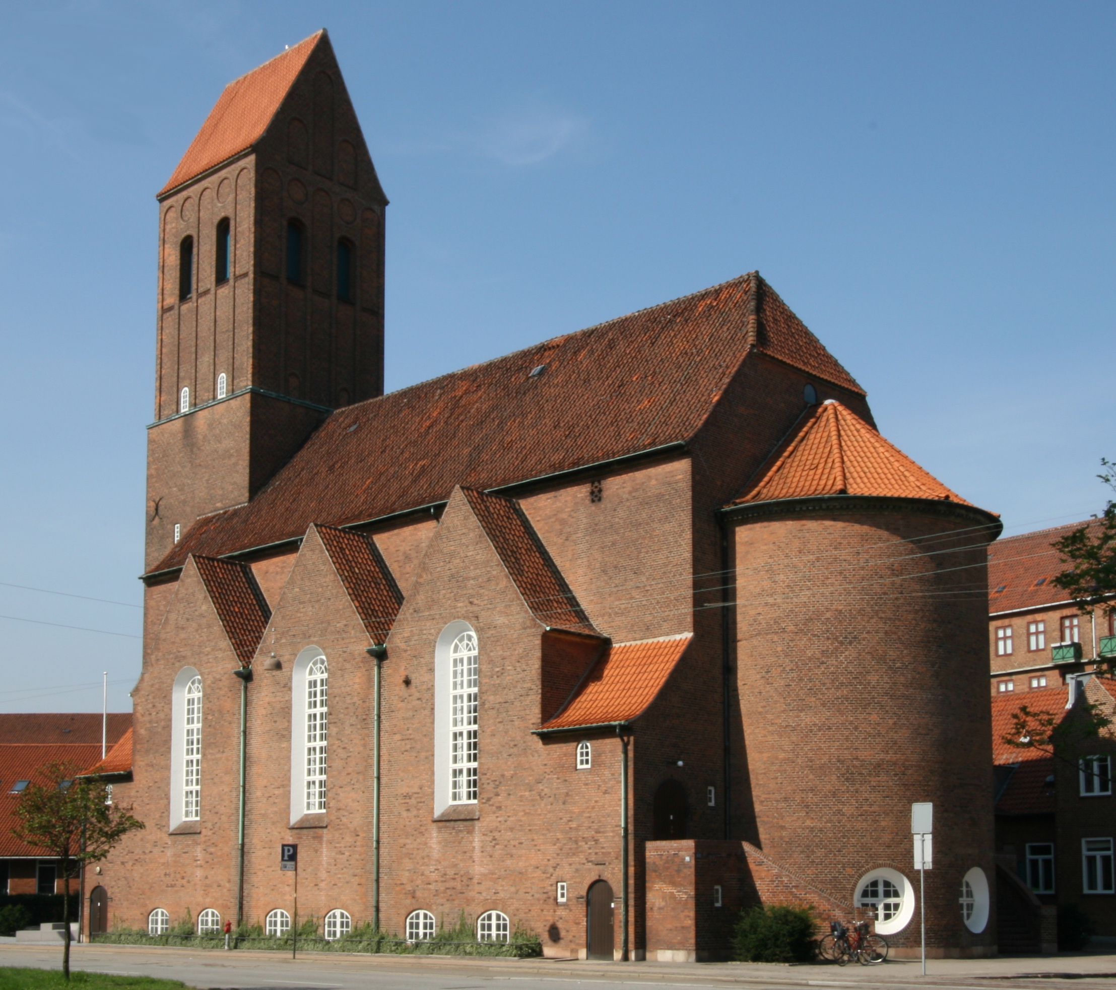 Taksigelseskirken in Copenhagen, Denmark.